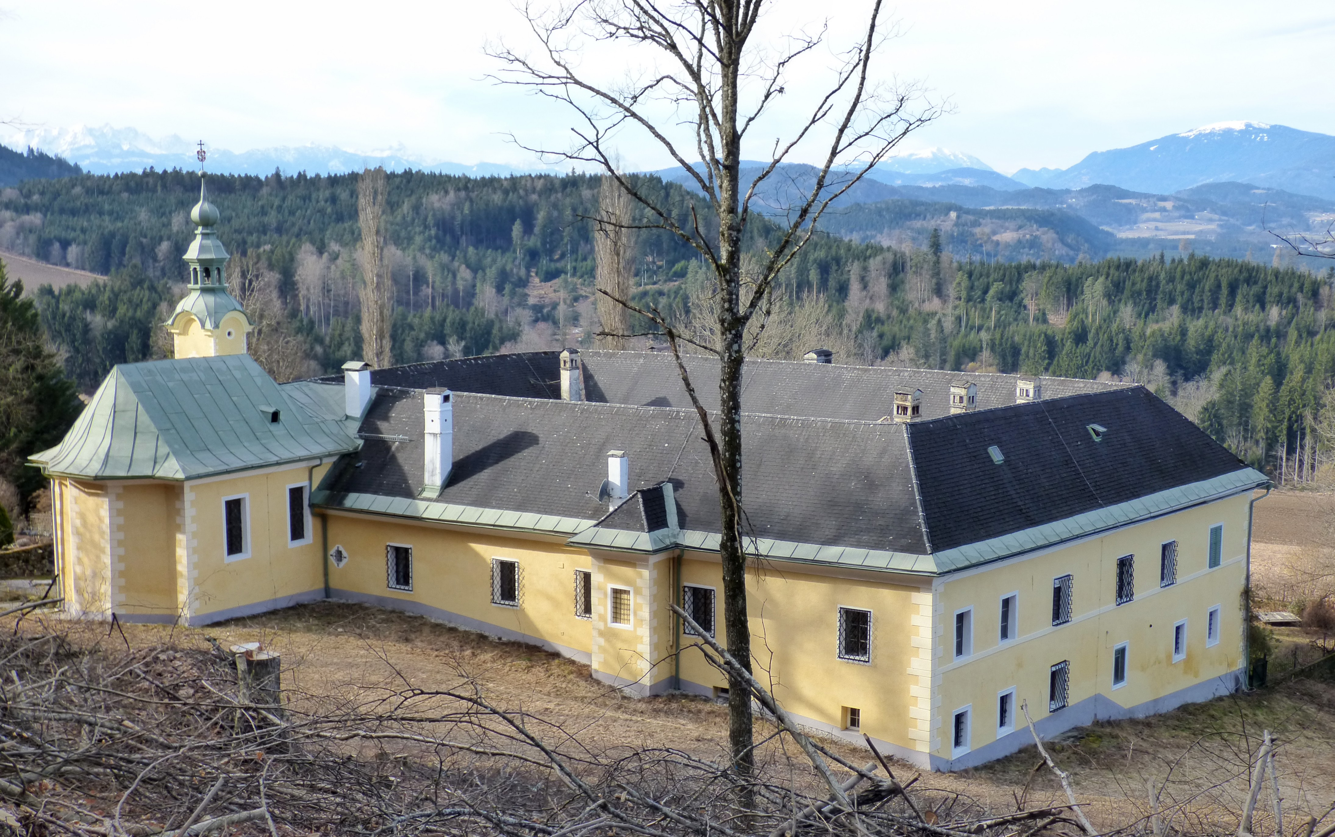 Schloss und Schlosskapelle Karlsberg, Kärnten